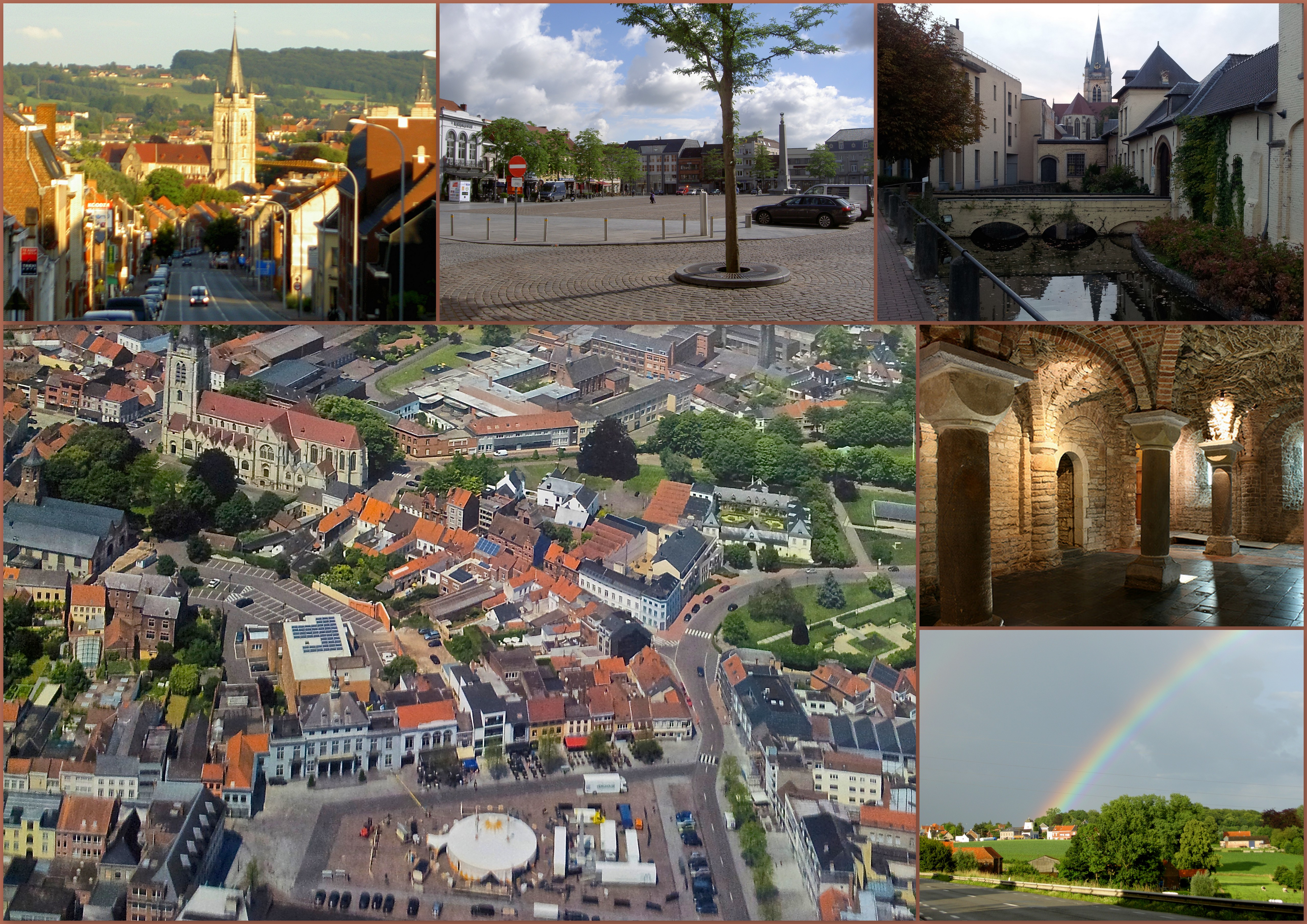 Mosaïque de photos de Ronse-Renaix (Belgique), réalisée sur Picasa (Source : )